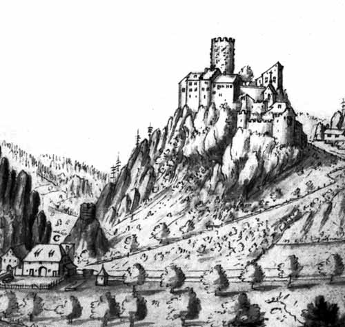 Burg Neu-Falkenstein bei Balsthal im Kanton Solothurn